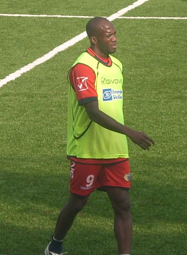 David Suazo al centro sportivo Torre del Grifo Village